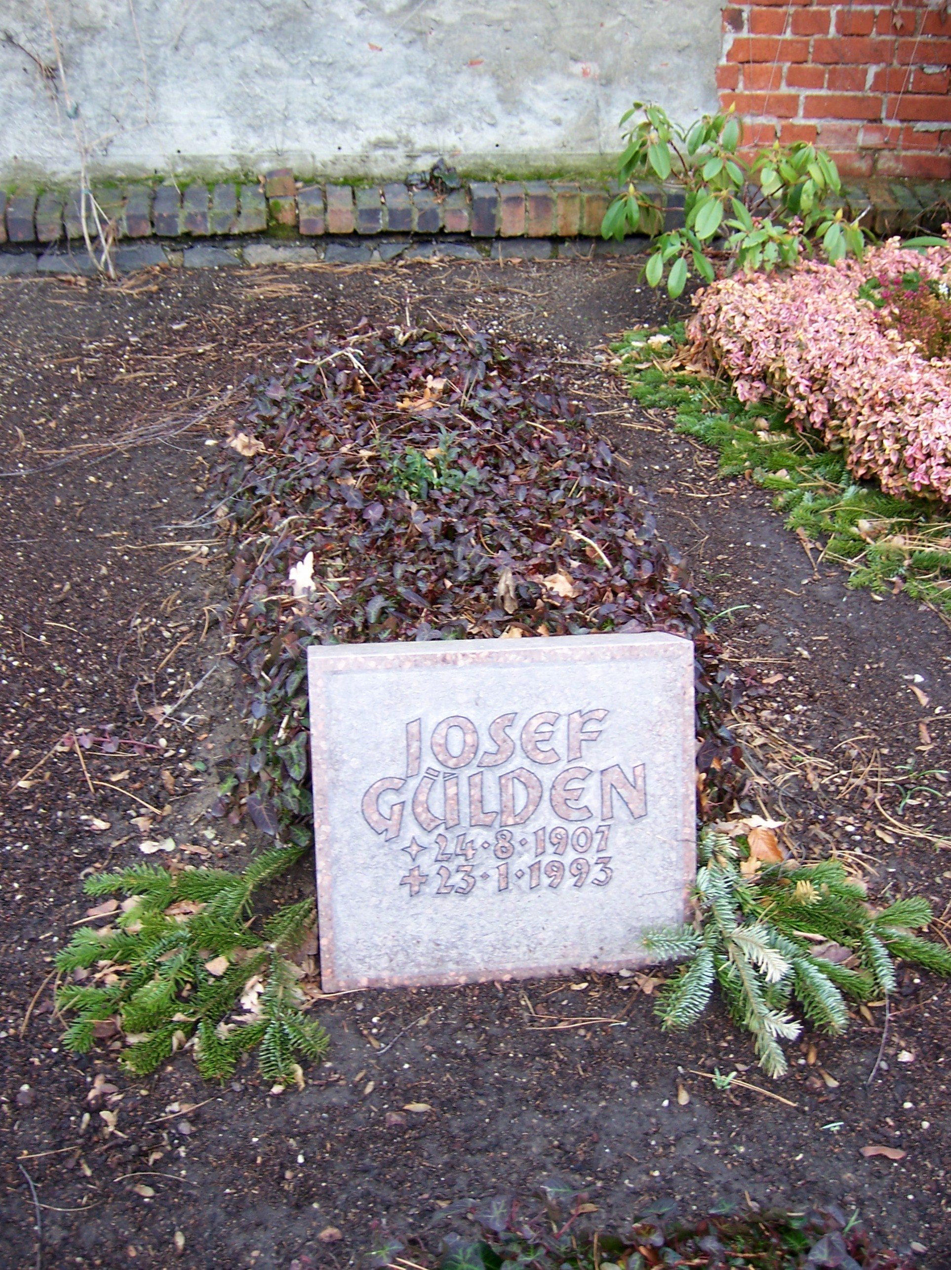 Grabstätte Josef Gülden